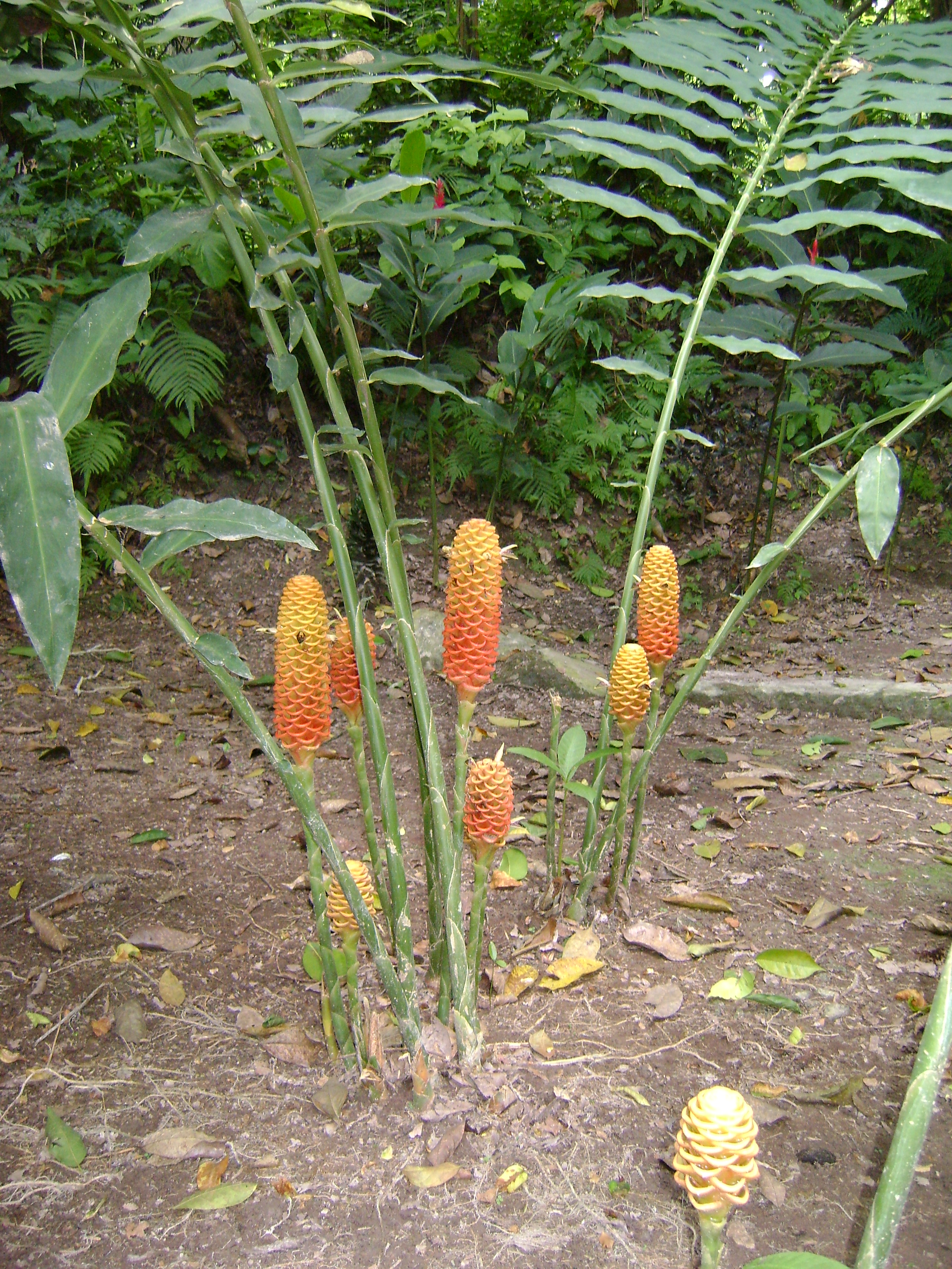 Jardin Botanico Guillermo Piñeres Turbaco